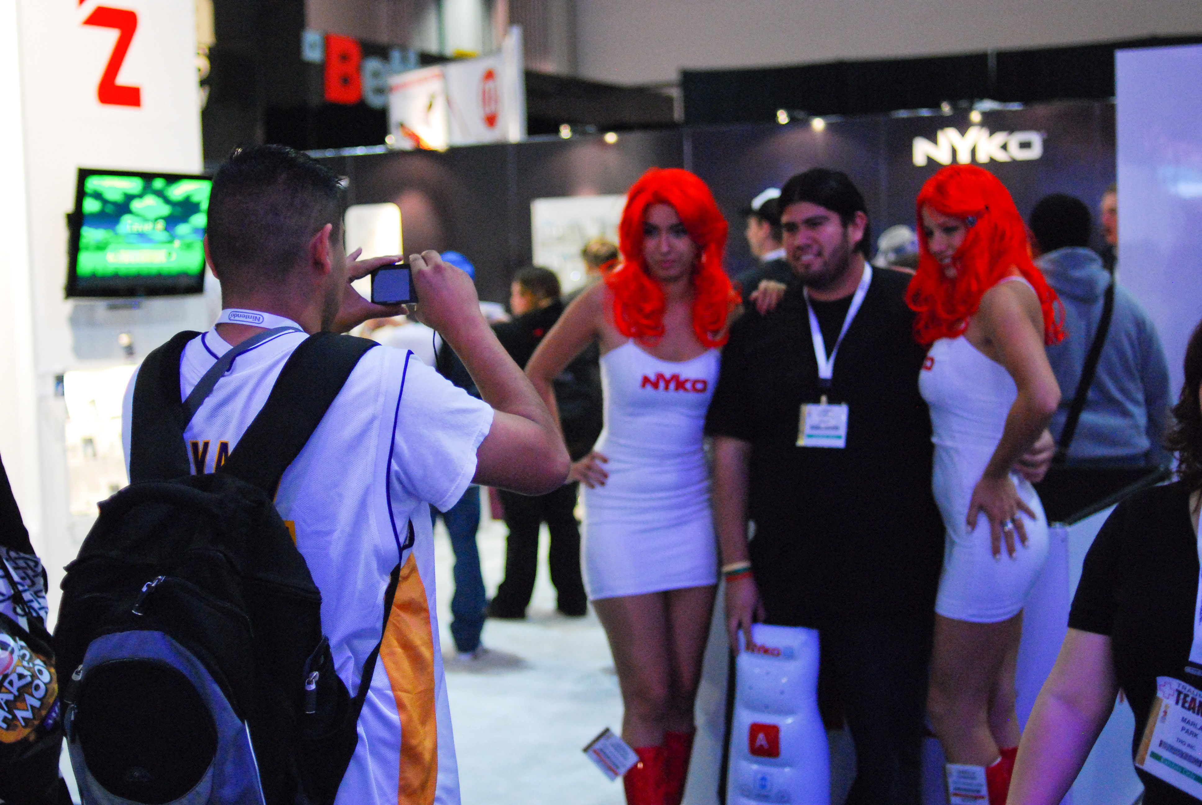 ghetto fabulous